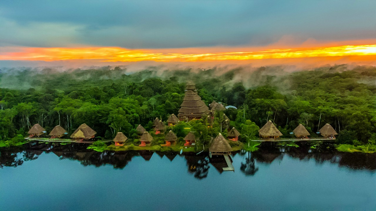 Instalaciones y cabañas de Napo Wildlife Center